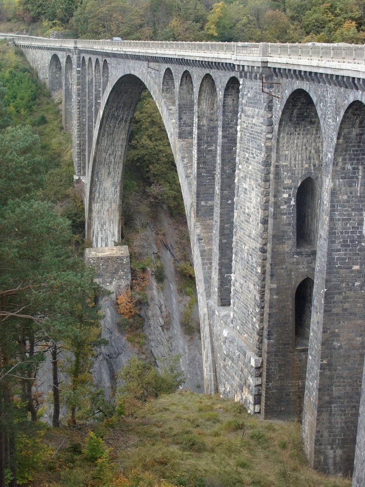 Viaduc de la Roizonne, l'arche centrale vue du sud côté aval.